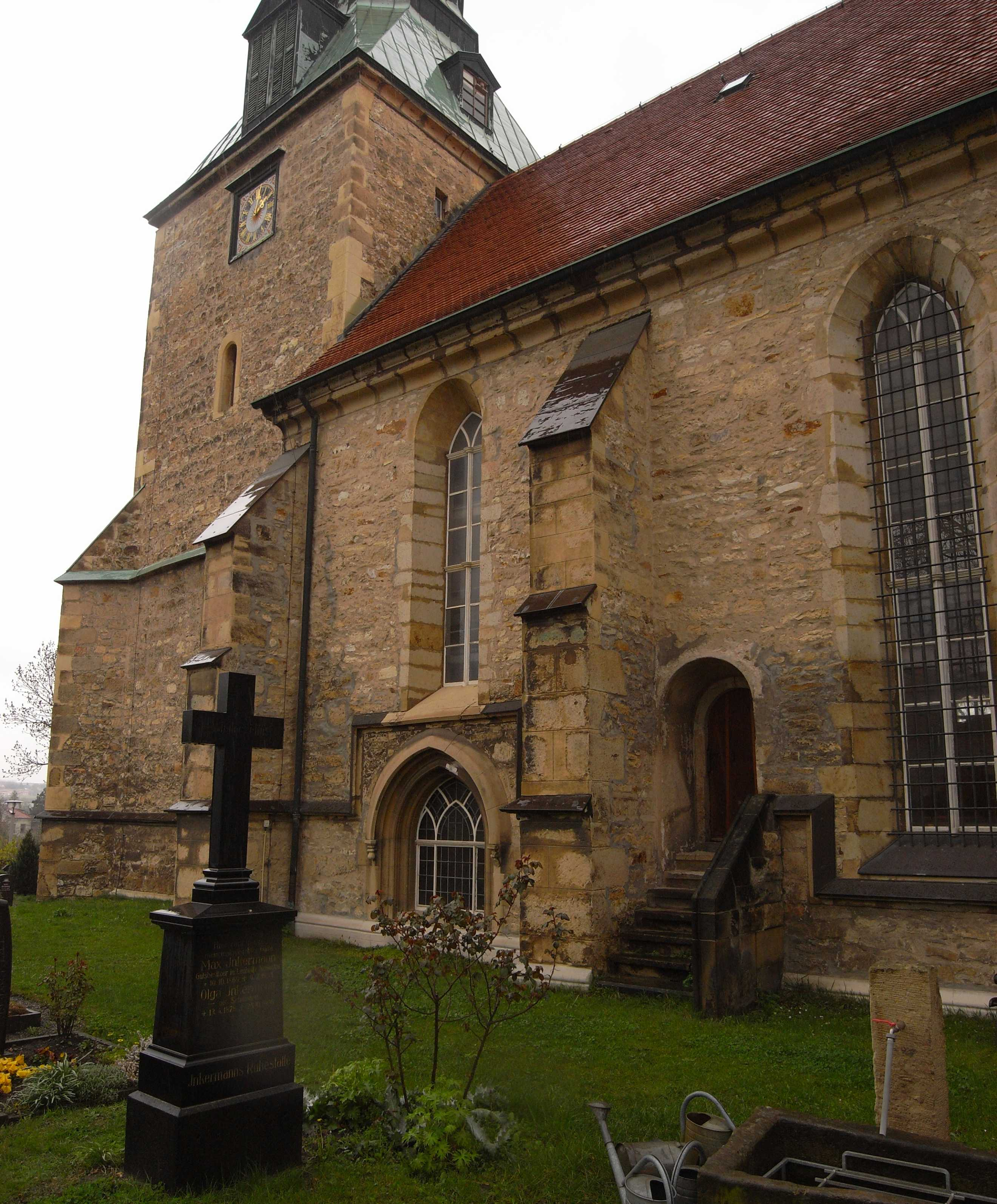 Dresden-Leubnitz-Neuostra, Kirche